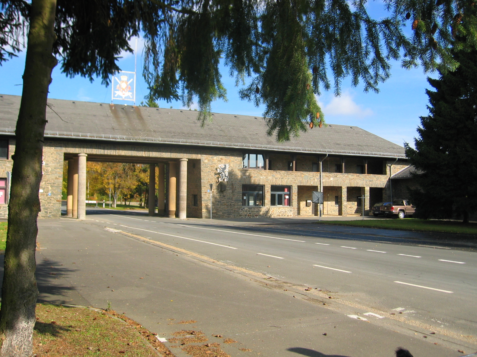 Malakoff,_Eingang zur Anlage Kaserne Vogelsang, auf dem Dach das Emblem der BSD (Belgischen Soldaten in Deutschland)